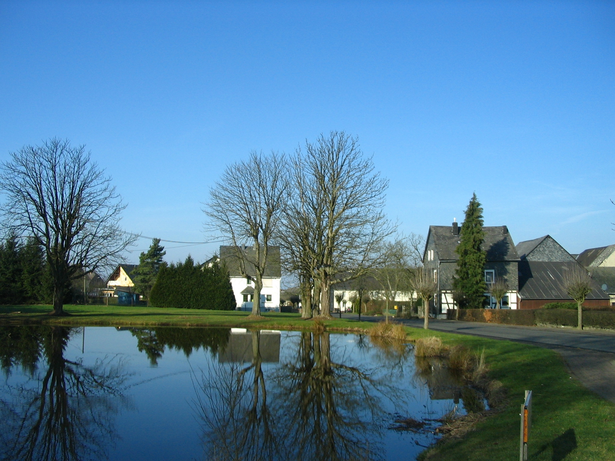 Weiher von Buch im Hunsrück